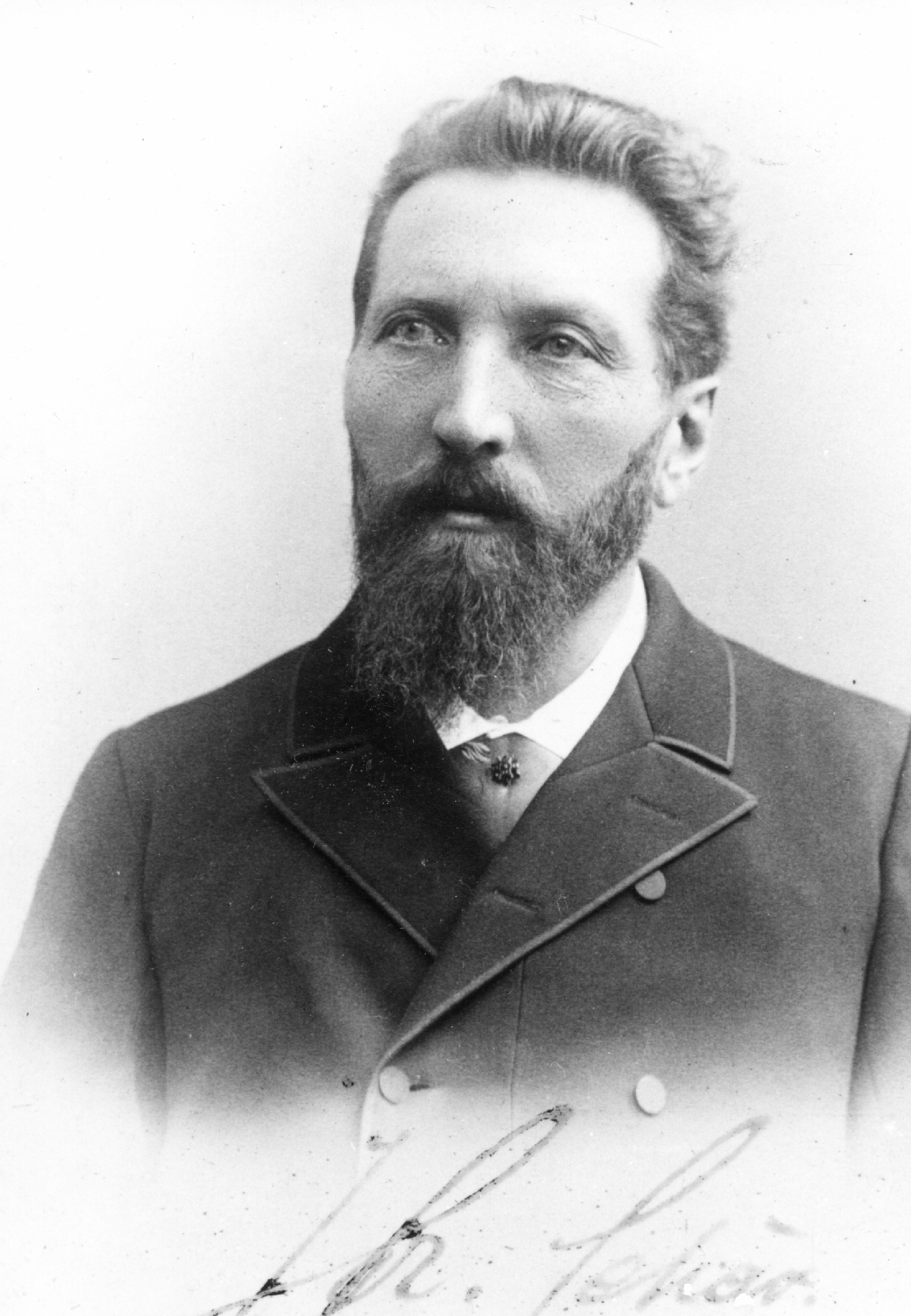 Johann Friedrich Schär, Betriebswirtschafter, Schweiz 1846-1924